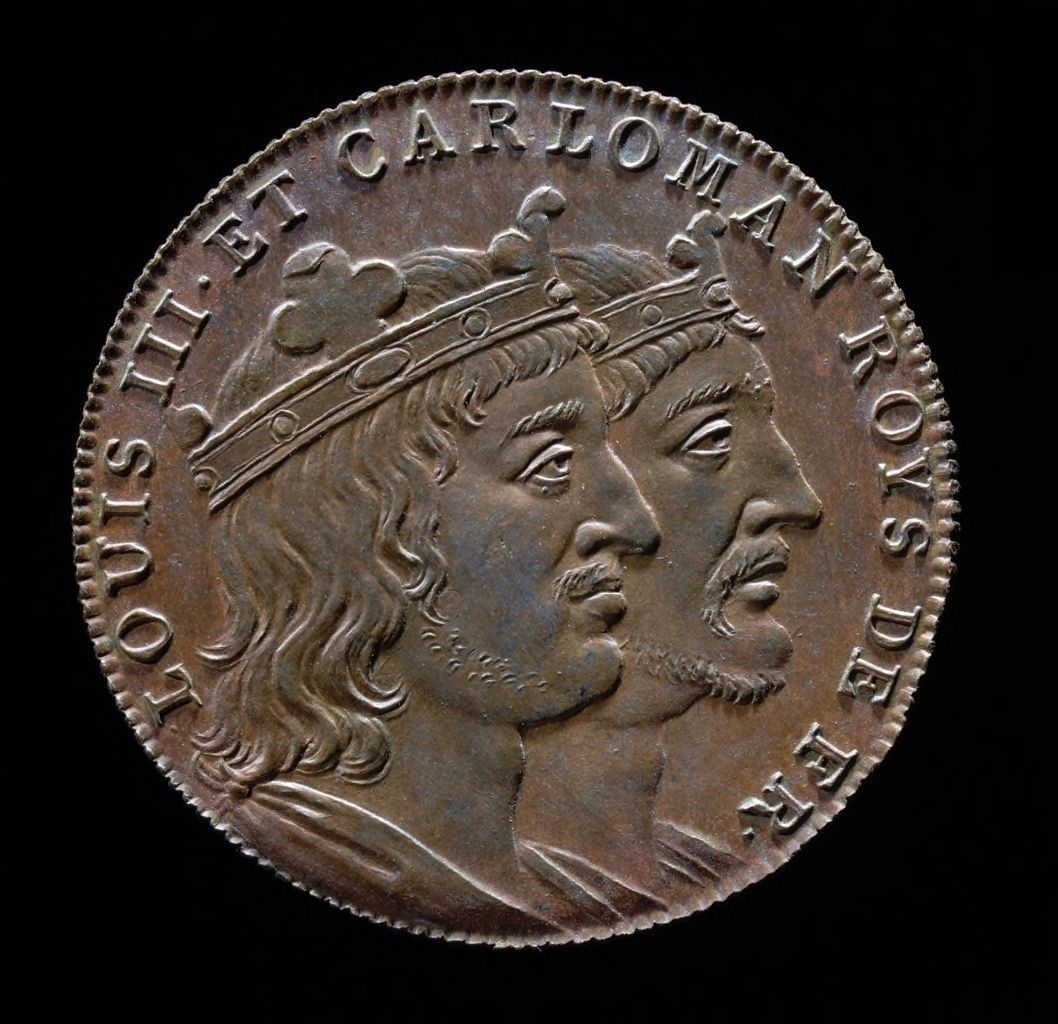 Louis III. et Carloman roys de Fr. [Image fixe numérisée] : [ Les bustes des deux rois couronnés, à droite et accolés ]